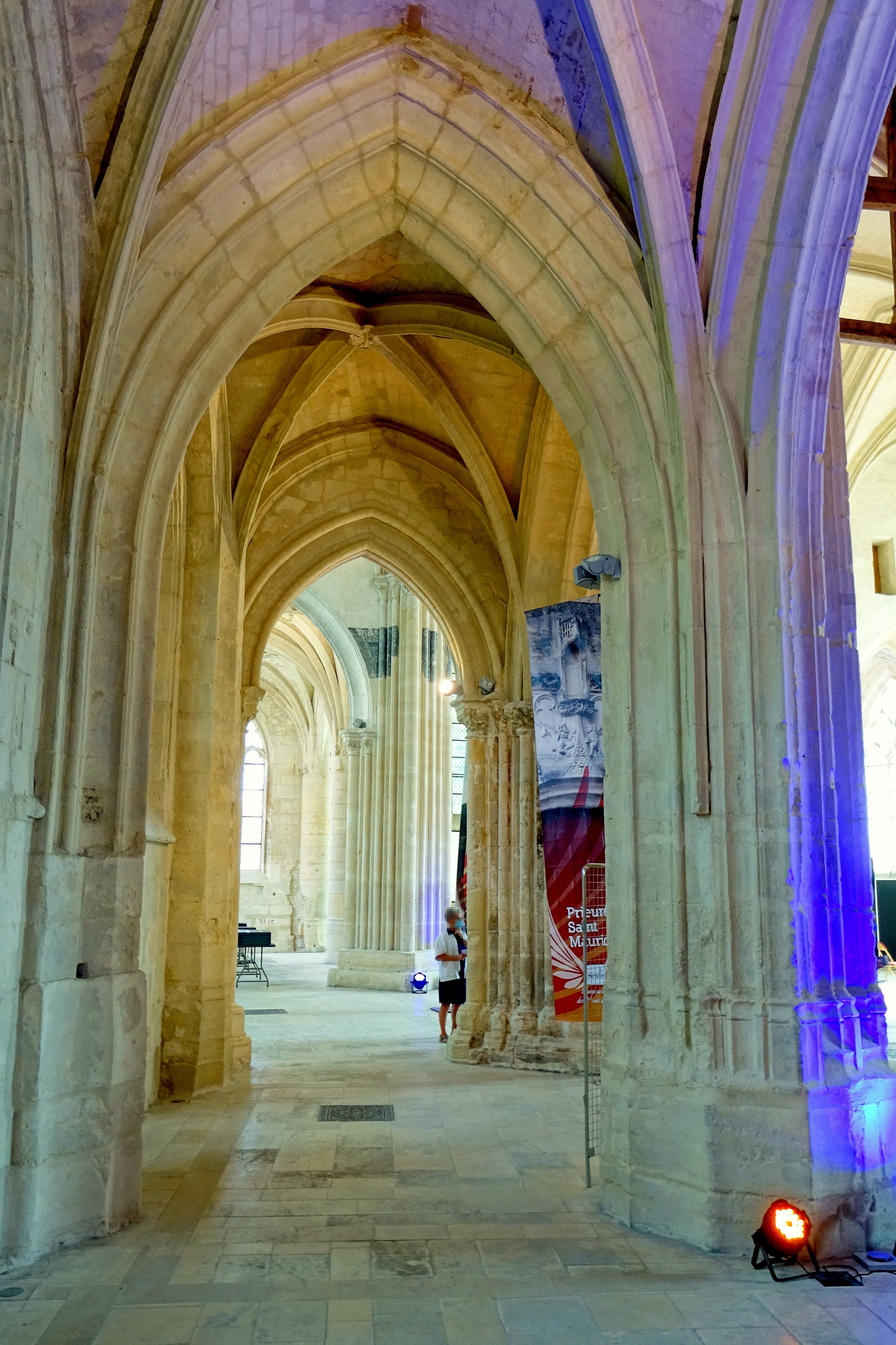 Intérieur de l'église - voir titre.